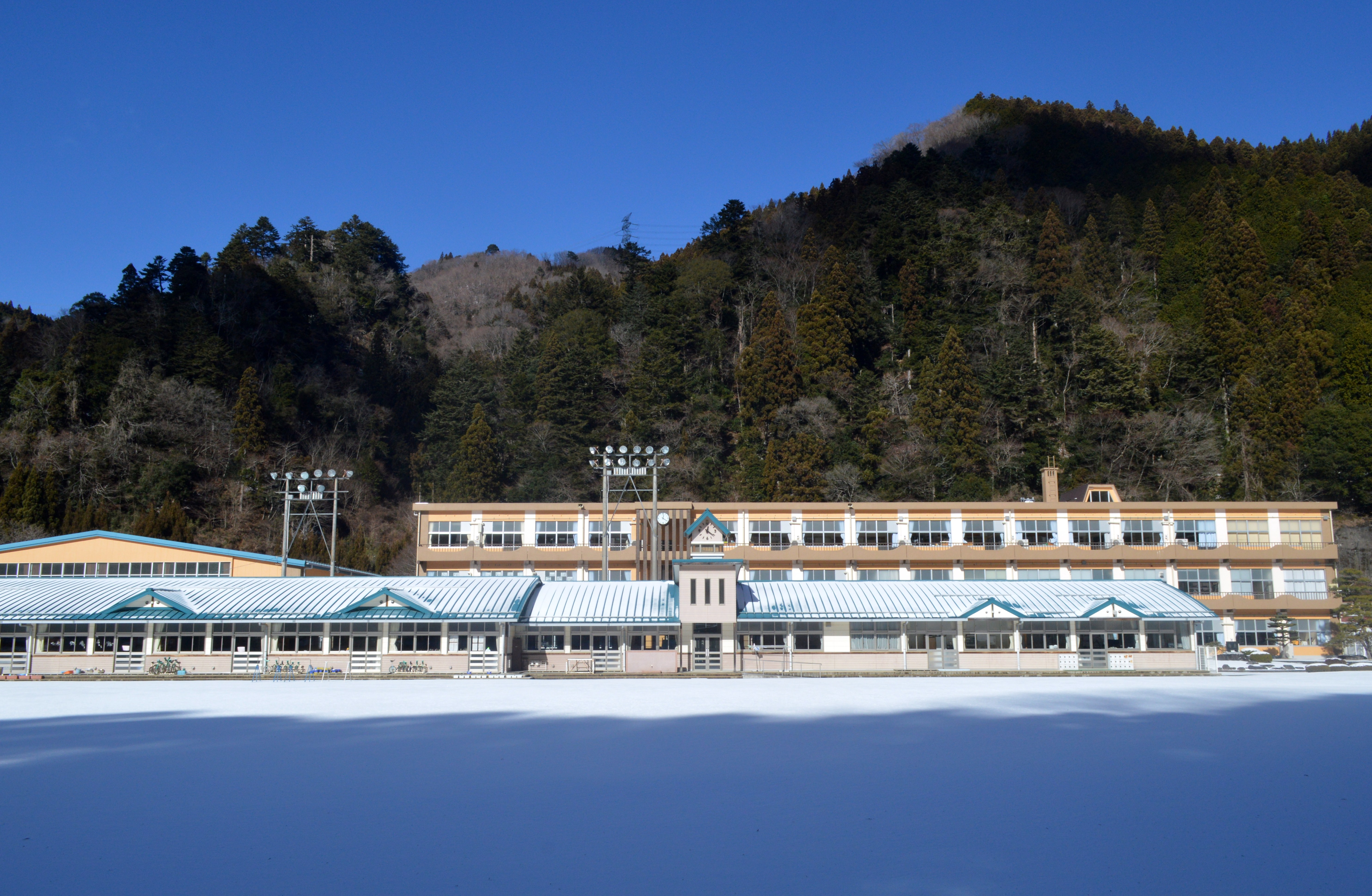 愛知県北設楽郡豊根村の豊根村立豊根小学校（手前）、豊根村立豊根中学校（奥）。